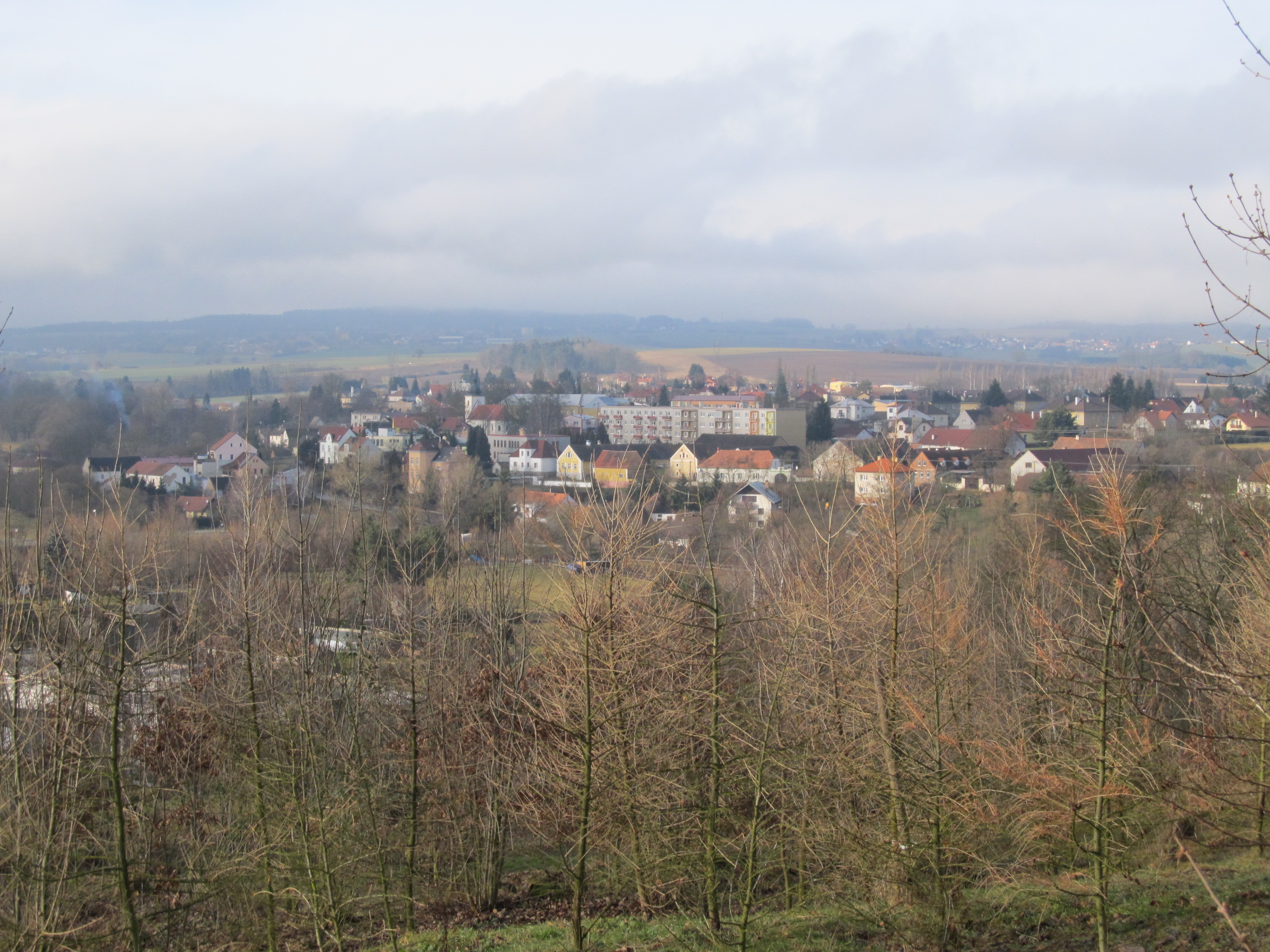 Nezvěstice z Varty